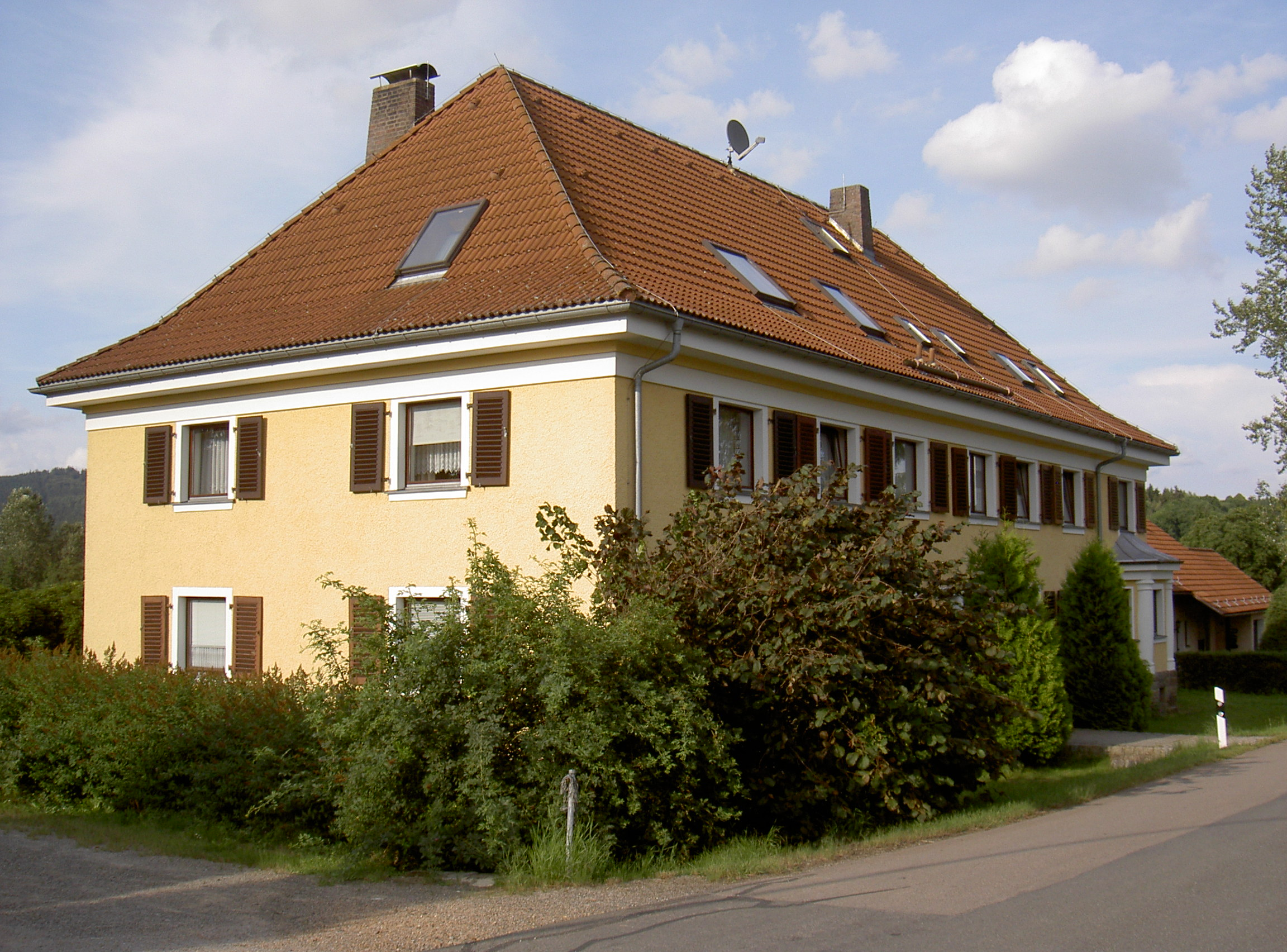 Schwarzach 20 Ehemaliges Zollhaus